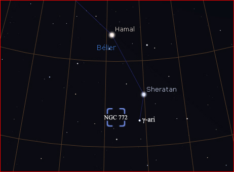 Position de NGC 772. Image obtenue avec le logiciel Stellarium.